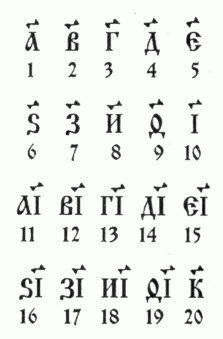 Brojevi od 1 do 20 pisani starom ćirilicom.